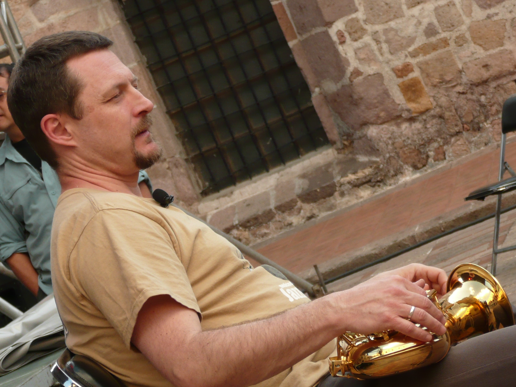 Maciej Sikała (ur. 7 września 1961 w Gdańsku) – polski saksofonista tenorowy i sopranowy. Zdjęcie wykonane 18 marca 2010 r. w Morelii (Meksyk).